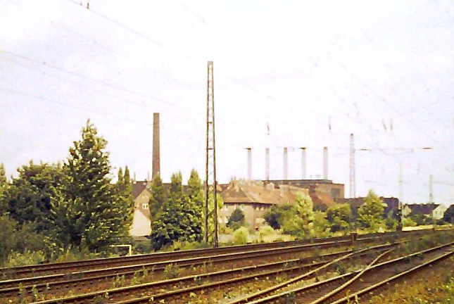 Kraftwerk Hannover Herrenhausen / Leinhausen, 1967